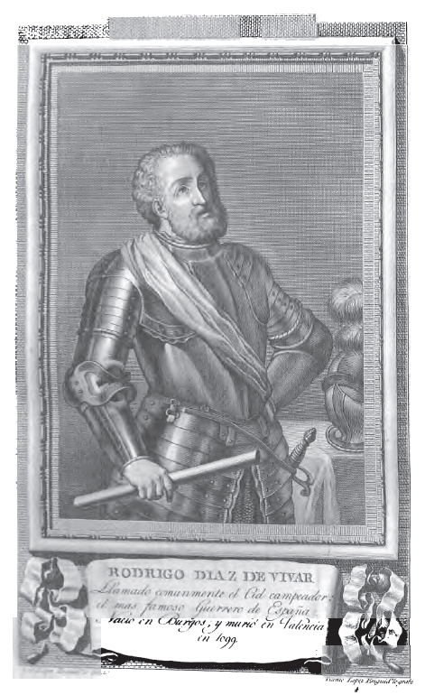 Retrato de Rodrigo Díaz de Vivar, el Cid Campeador.